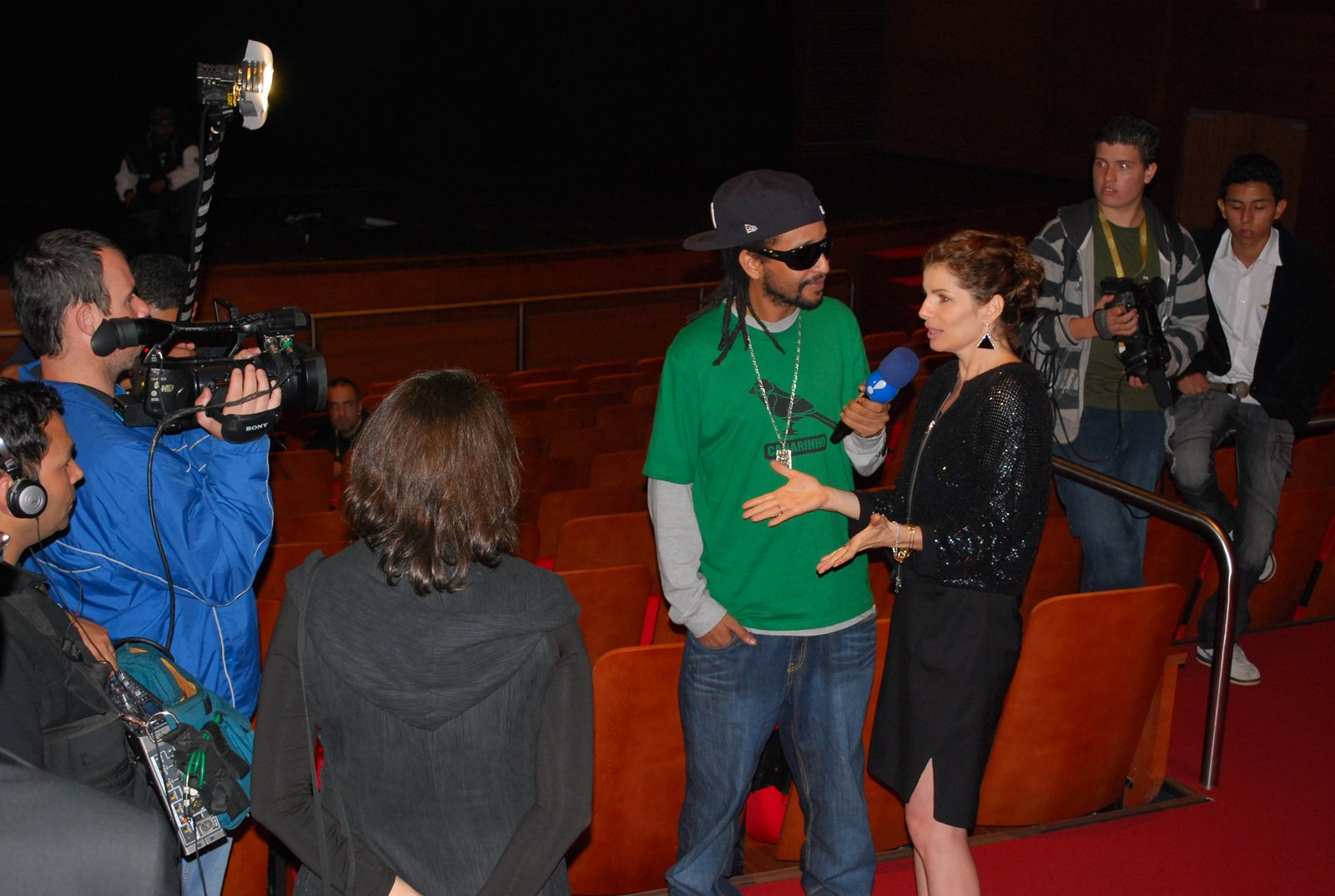 MC Rappórter entrevista Débora Bloch no II Festival Paulínia de Cinema.